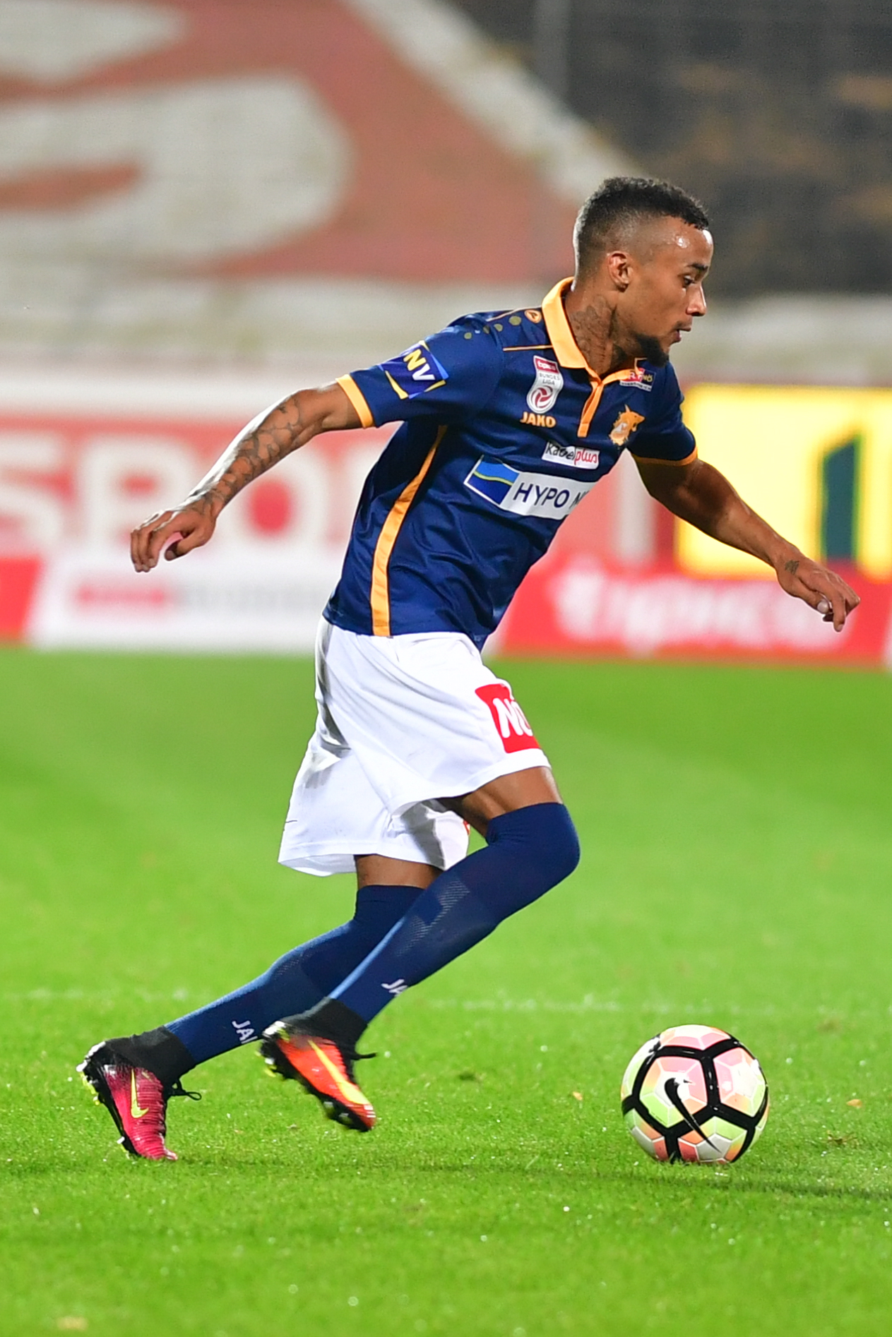 Fußball Bundesliga - FC Admira Wacker Mödling vs SKN St. Pölten. Bild Jeroen Lumu (SKN).